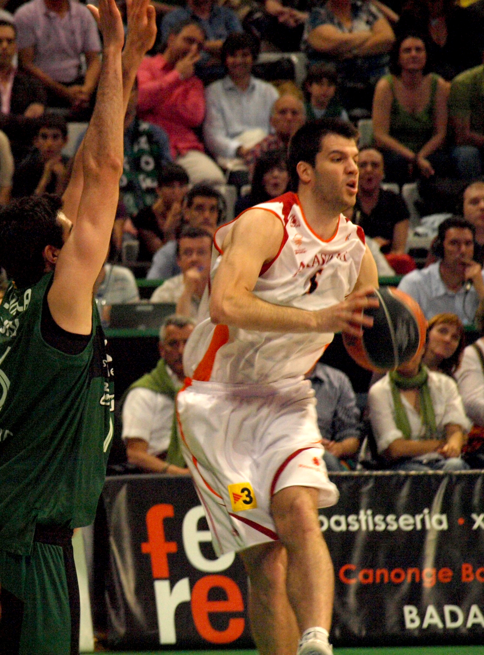 Branko Cvetkovic con la camiseta del Akasvayu Girona en un partido correspondiente a los cuartos de final de la liga ACB 2007-08 en el Olímpico de Badalona.